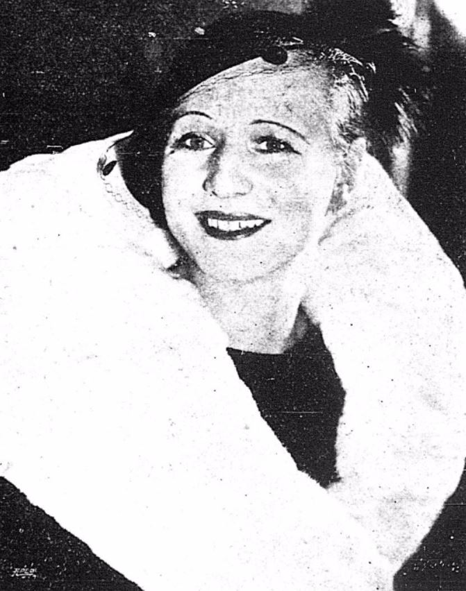 Ola Lilith, znana artystka scen żydowskich została zaangażowana do "Rexu" na szereg występów gościnnych